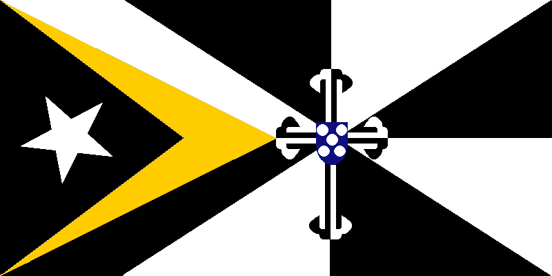 Bandeira do Oecusse. Em Lifau no Distrito de Oecussi-Ambeno fundaram os Dominicanos a primeira colónia em Timor. A eles se referem o preto, o branco e a cruz. Oecussi-Ambeno foi, no Timor Oeste, a única região que permaneceu em poder de Portugal. A „quina“ lembra o passado português.